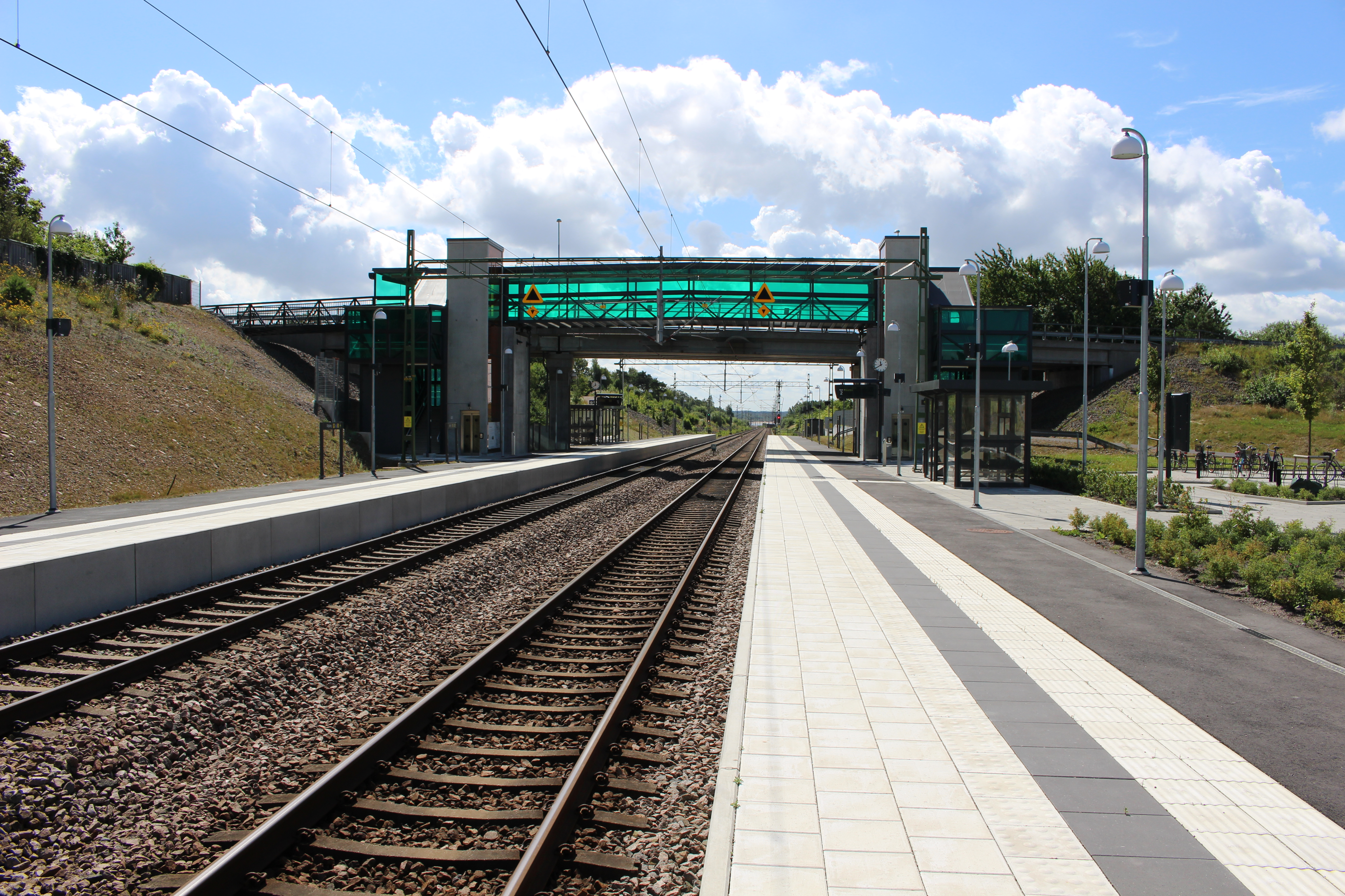 Barkåkra station från norr.